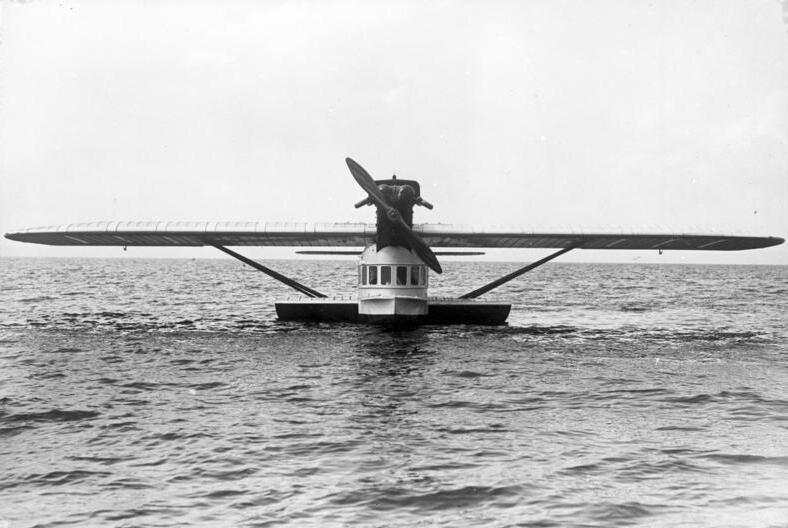 Ein neues Dornier-Flugboot für 10 Passagiere, welches kürzlich für den Binnensee- und Flussverkehr übergeben wurde. Das Flugboot ist mit einem 50 PS-Motor ausgerüstet und erreicht eine Stundengeschwindigkeit von 200 k. Vorderansicht des neuen deutschen Dornier-Flugbootes "Delphin III" mit der Kajütte, welche 10 Personen fäßt.